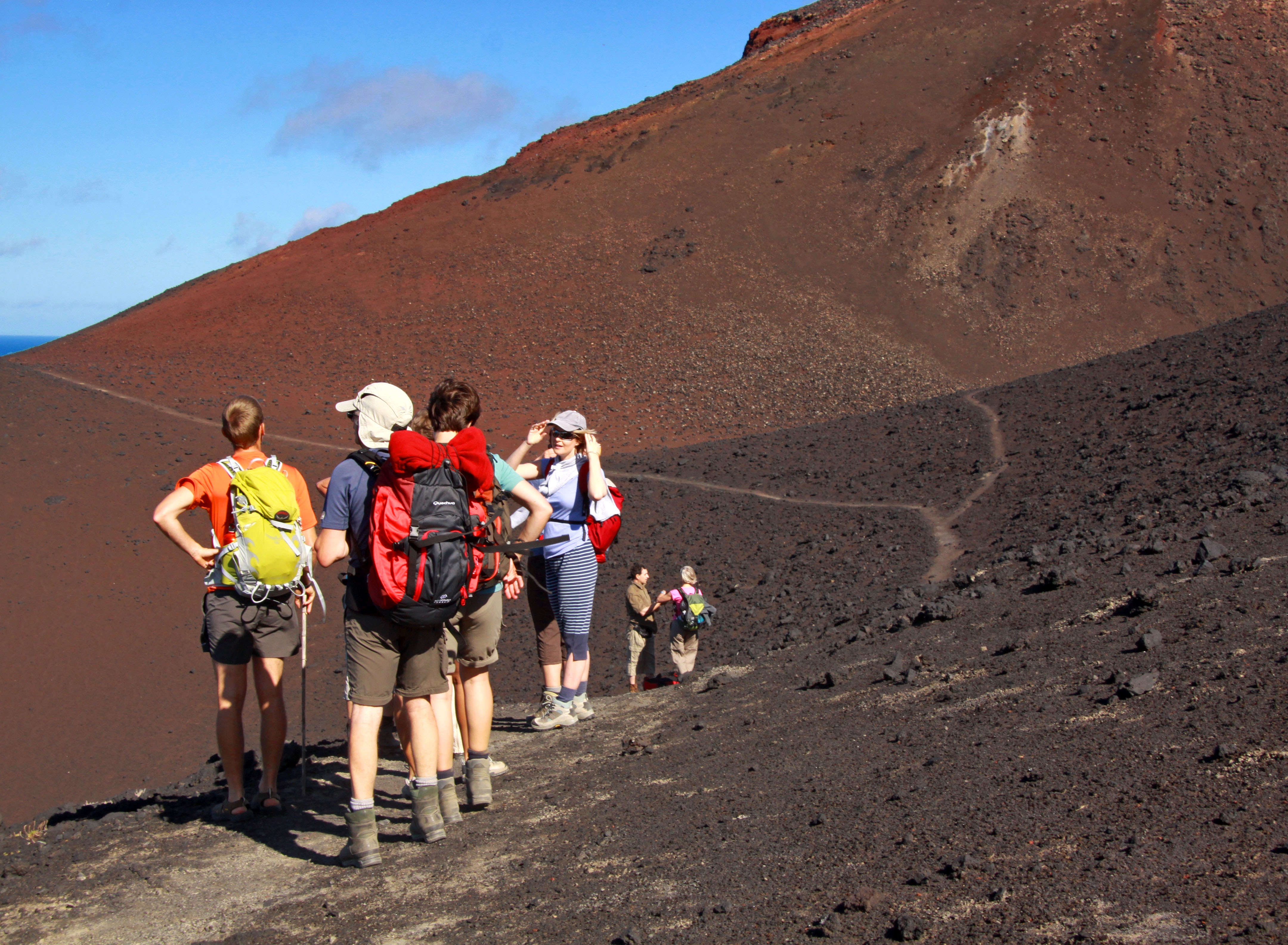 Ilha do Faial, Açores. A la Ponta dos Capelinhos.